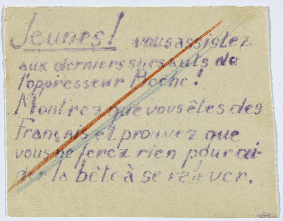 Tract appelant la jeunesse à la Résistance.